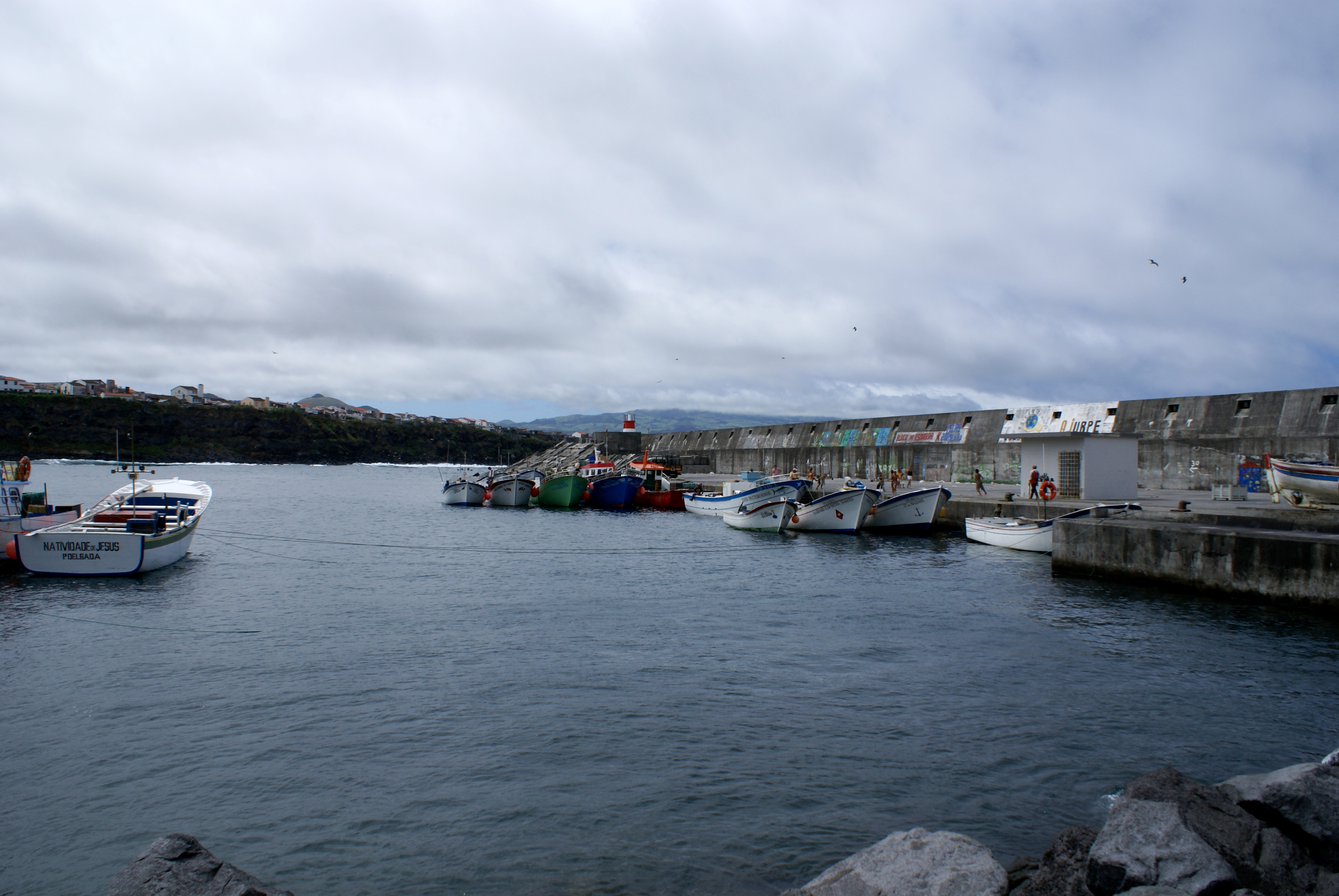 Vista parcial do Porto de Rabo de Peixe, Ribeira Grande, ilha de São Miguel, Açores